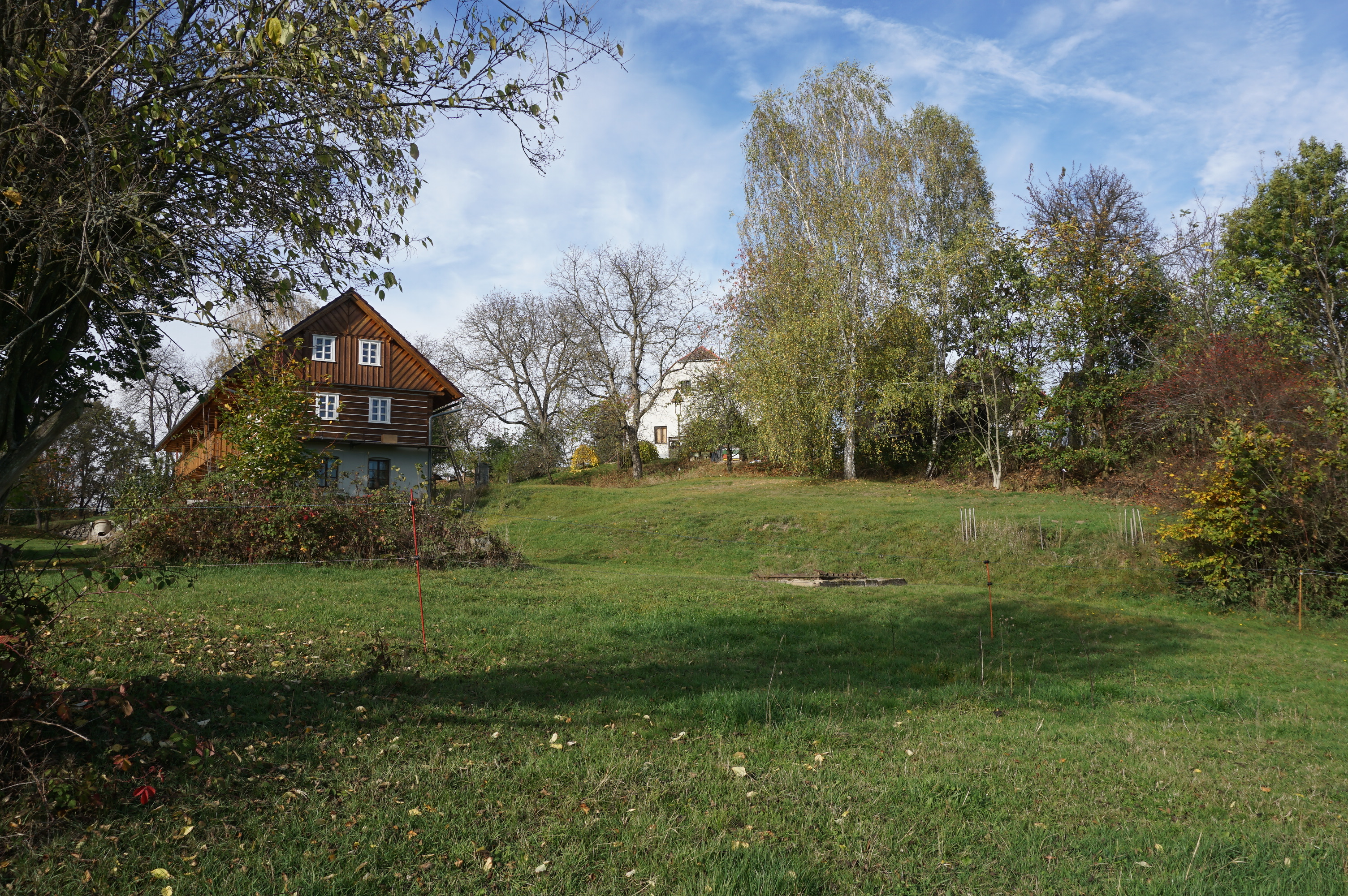 Rokytnice (u Hrubé Skály) - celkový pohled od jihovýchodu